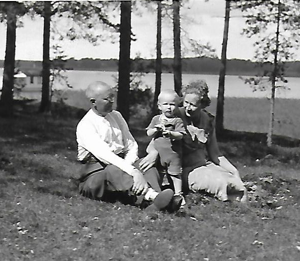 Verner Virtanen, Siiri ja Rauno Ali-Kokkilassa 1935